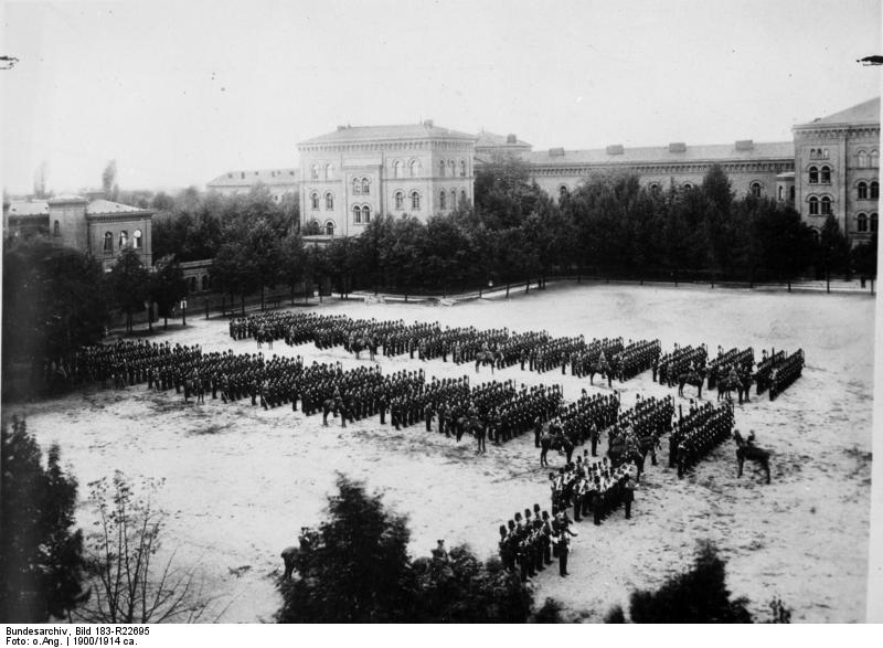 Berlin, Hauptkadettenanstalt, Morgenparade ADN-ZB Die Armee im kaiserlichen Deutschland In der Haupkadettenanstalt Lichterfelde bei Berlin - große Morgenparade mit Ansprache des Kommandeurs. (Aufnahme entstand zwischen 1900 und 1914) [Berlin-Lichterfelde, Preußische Hauptkadettenanstalt]